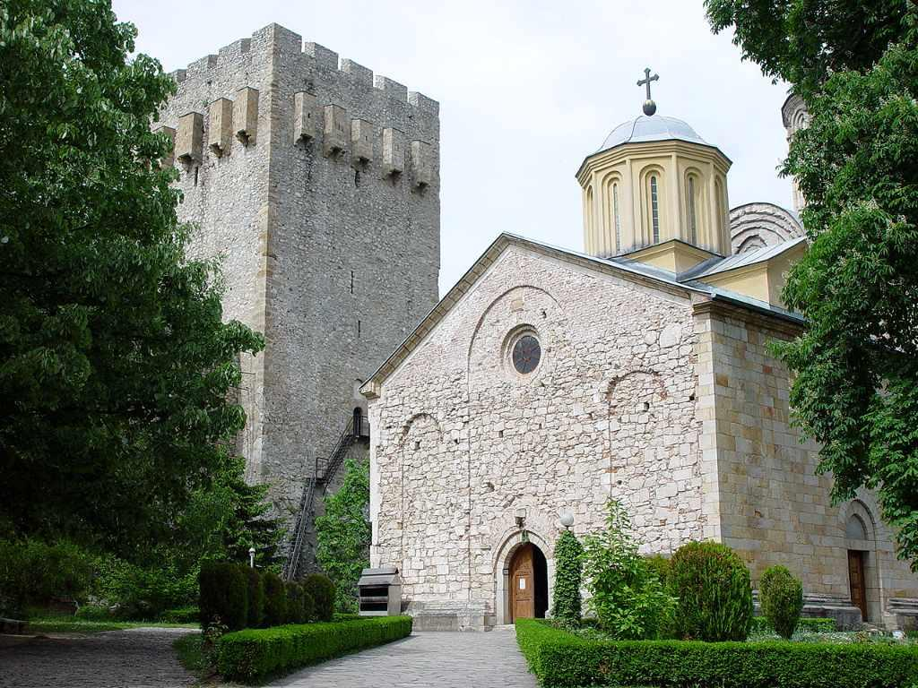 Mansija monastery, near Despotovac, Serbia/Monastère orthodoxe serbe de Manasija, près de Despotovac, Serbie